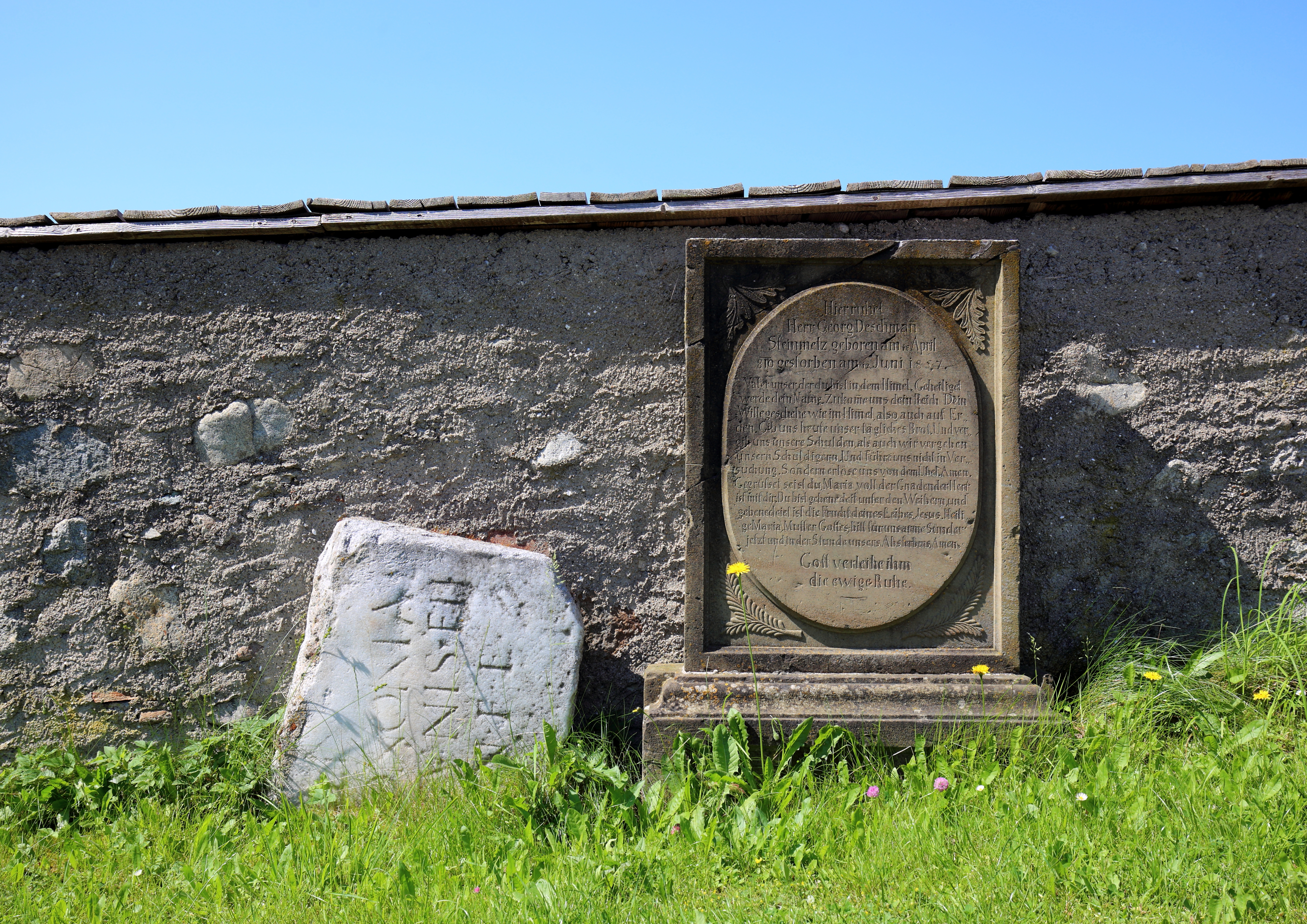 Ein Römersteinfragment und der Grabstein von Steinmetz Georg Deschmann, gestorben 1857, am Friedhof von Feistritz bei Knittelfeld, ein Ortsteil der österreichischen Gemeinde Sankt Marein-Feistritz im steirischen Bezirk Murtal.